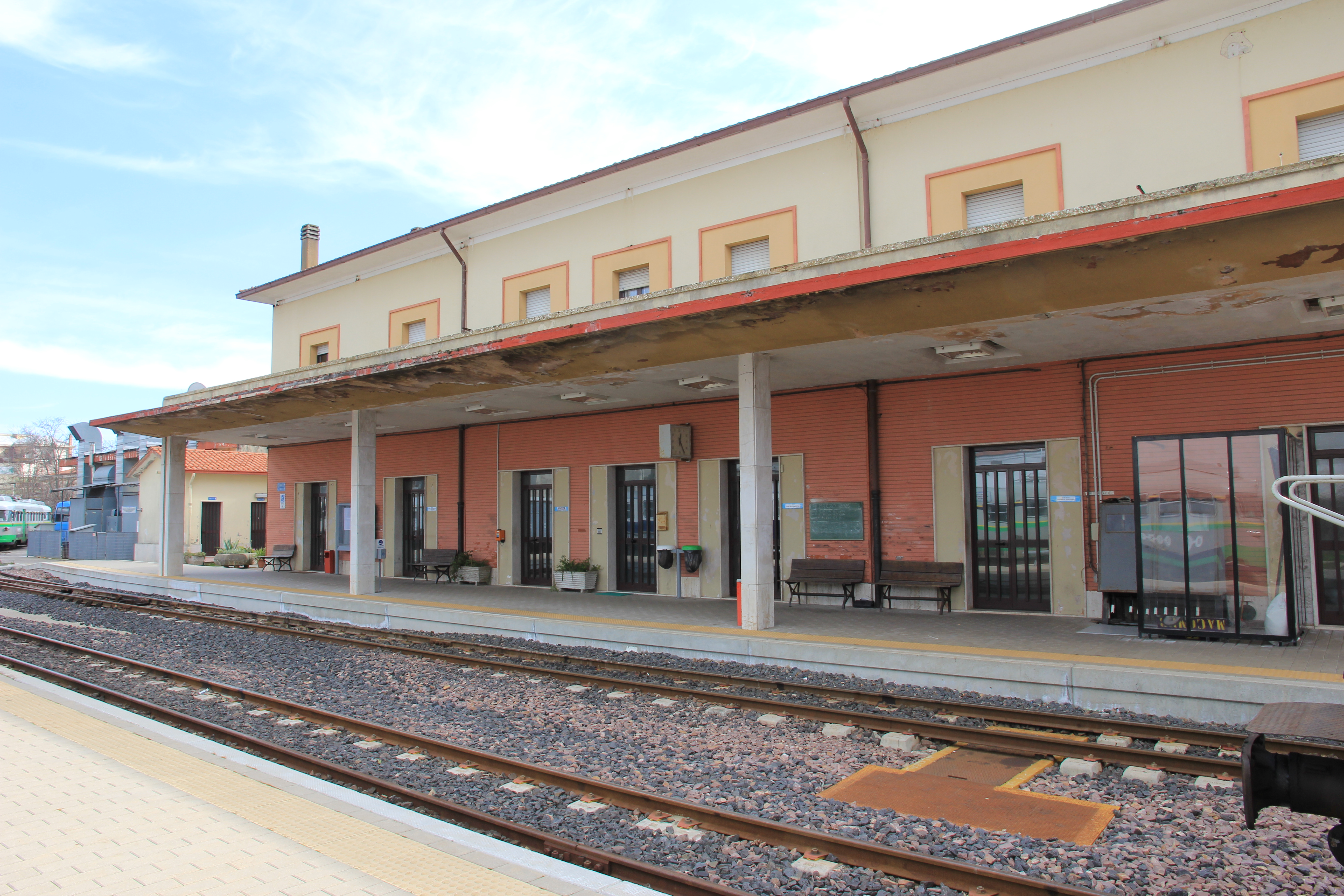 Macomer - Stazione ferroviaria ARST